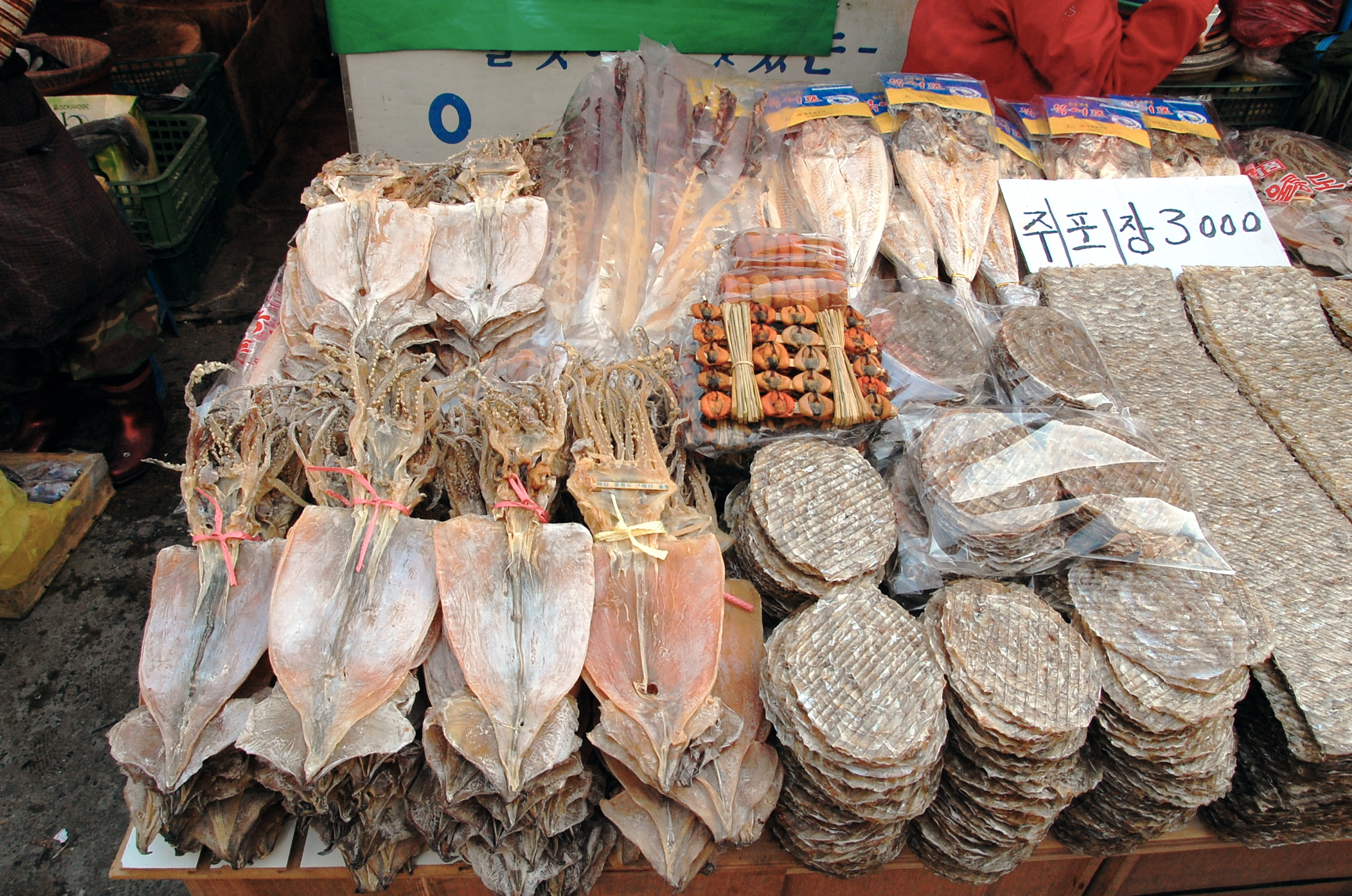 A street vendor selling geoneopo, dried seafood in Korean